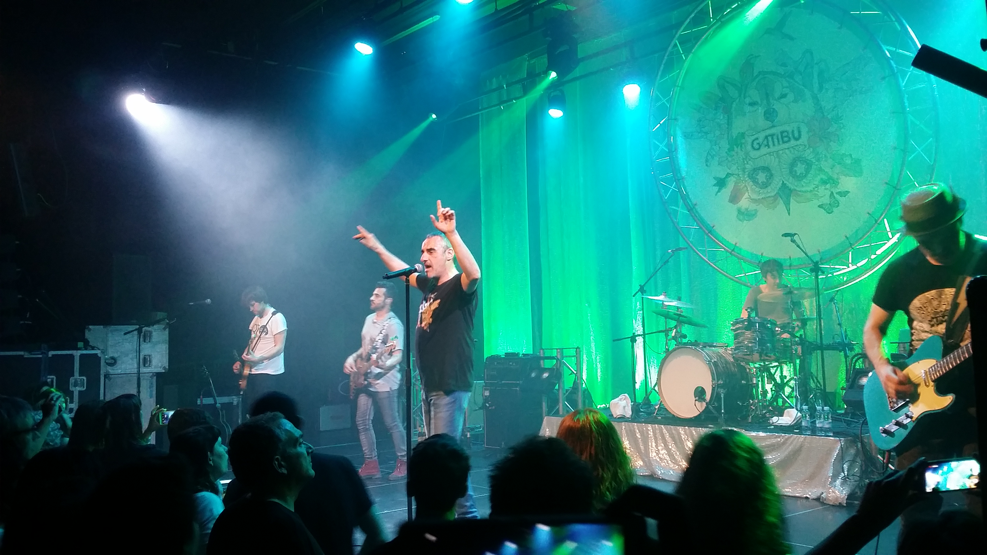 Gatibu, Intxaurrondo Kultur Etxean 2017